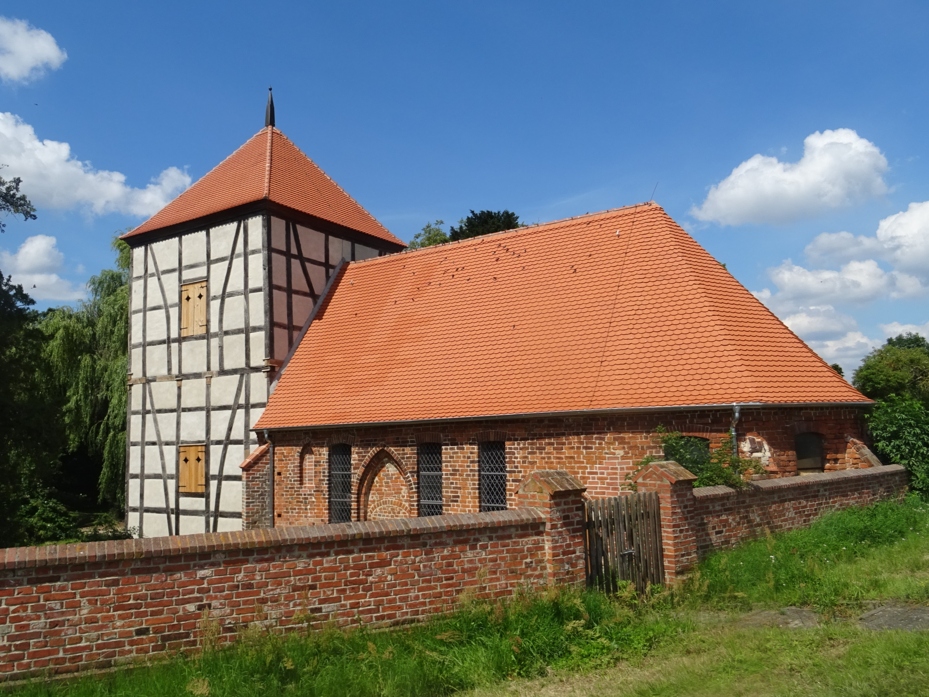 Kirche Räbel, Ansicht von Südosten